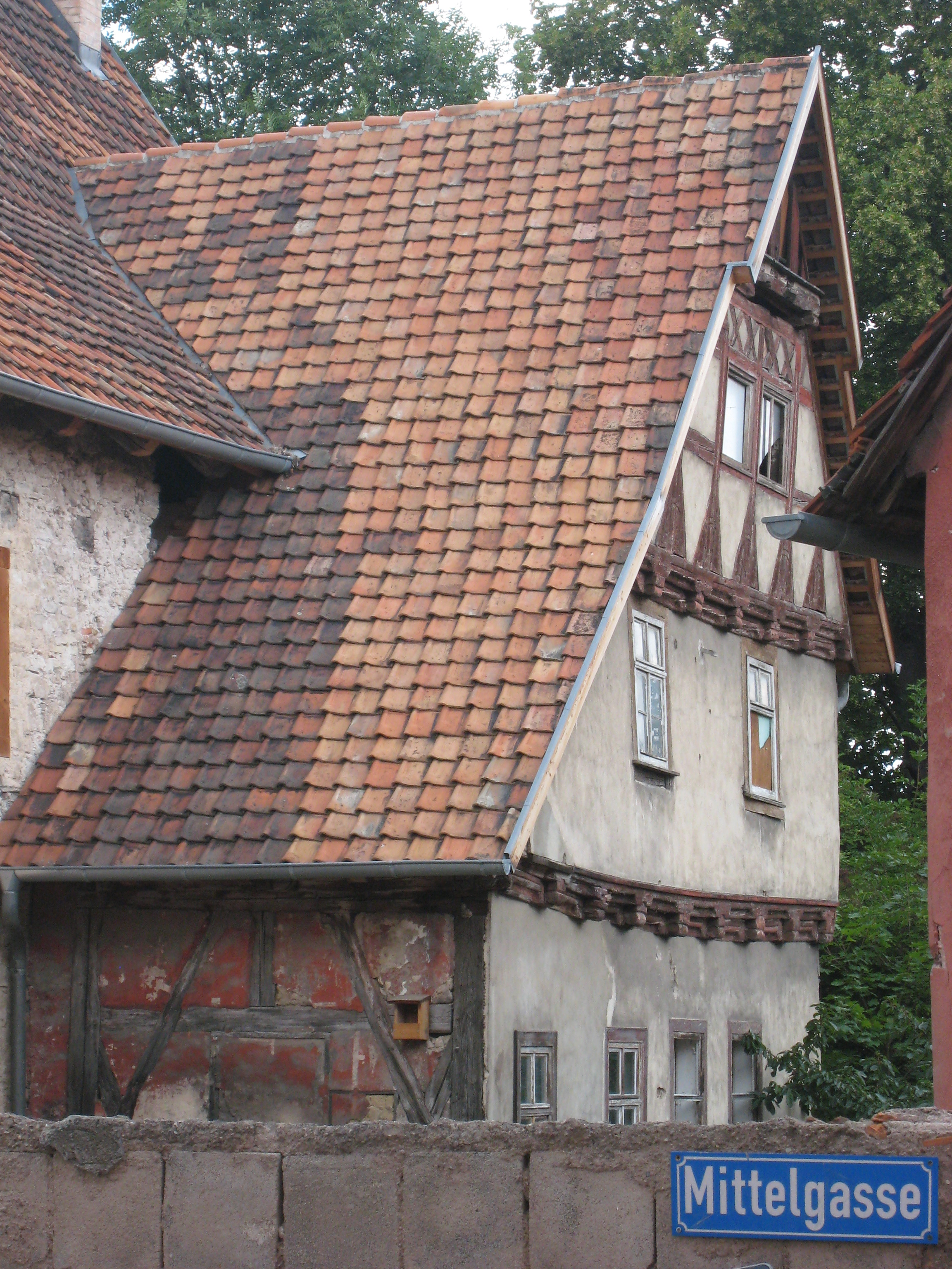 Oberkloster in Arnstadt